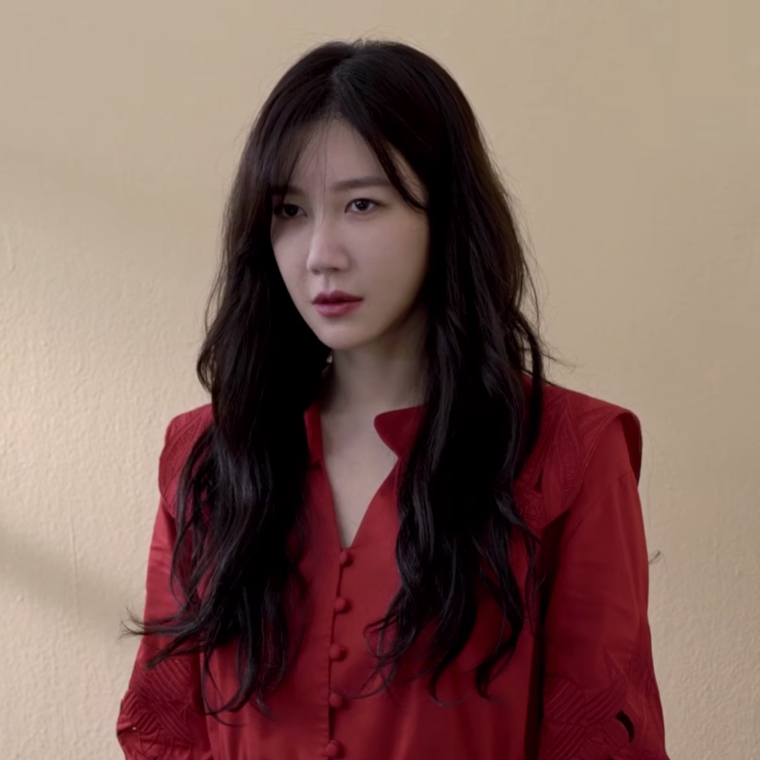 이지아 배우가 출연한 오늘의 탐정이 종영하게 되었습니다. 아쉬운 마음에 공개하는 포스터 촬영 현장! 영상으로 확인하세요 :)